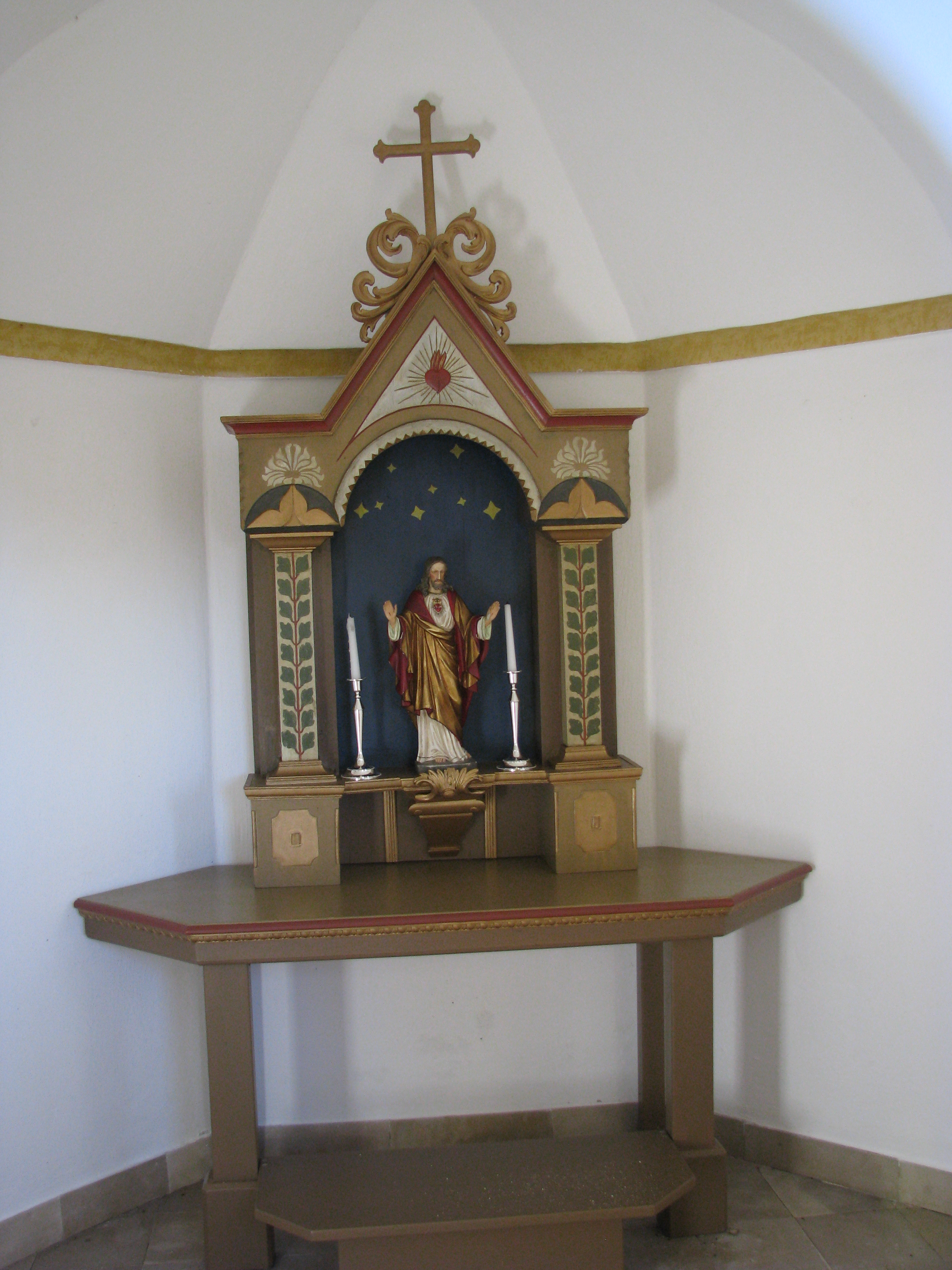 Marquardsholz, Ortsteil von Hilpoltstein im mittelfränkischen Landkreis Roth, Altar der Götzkapelle